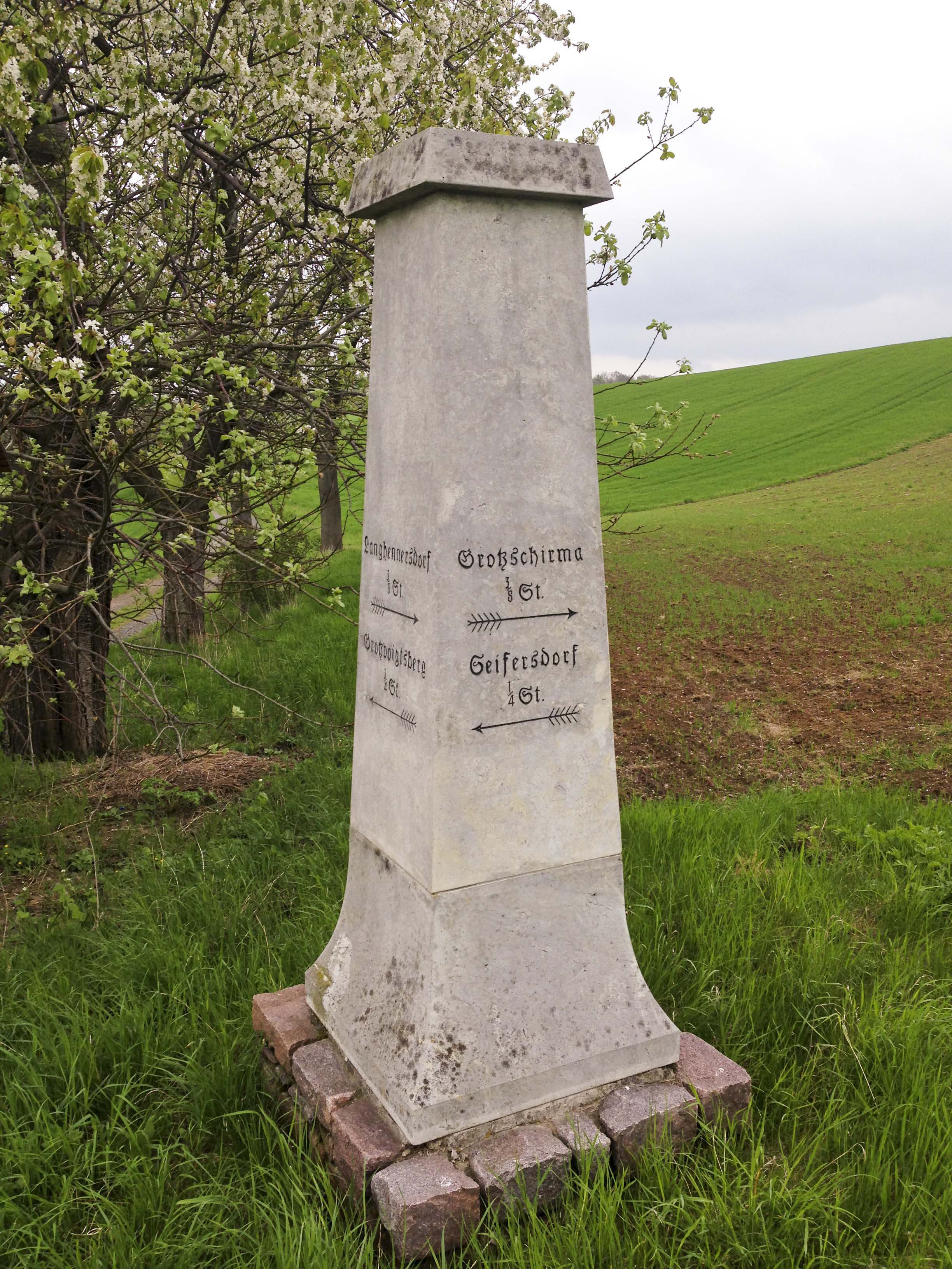 Distanzsäele in Seifersdorf Ehemalige Ganzmeilenpostsäule mit Standort in Großvoigtsberg. 1860 zur Wegsäule umgearbeitet und das Untereil hier aufgestellt. Inschrift: Langhennersdorf 3/8 St. ; Großvoigtsberg ¾ St. ; Großschirma 3/8 St. ; Seifersdorf ¼ St.